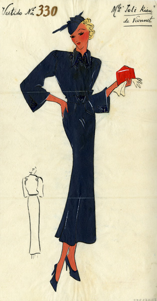 Ilustración. Figurín de un vestido de Madeleine Vionnet visto por el delantero y la espalda. Fábrica de bordados (Barcelona).